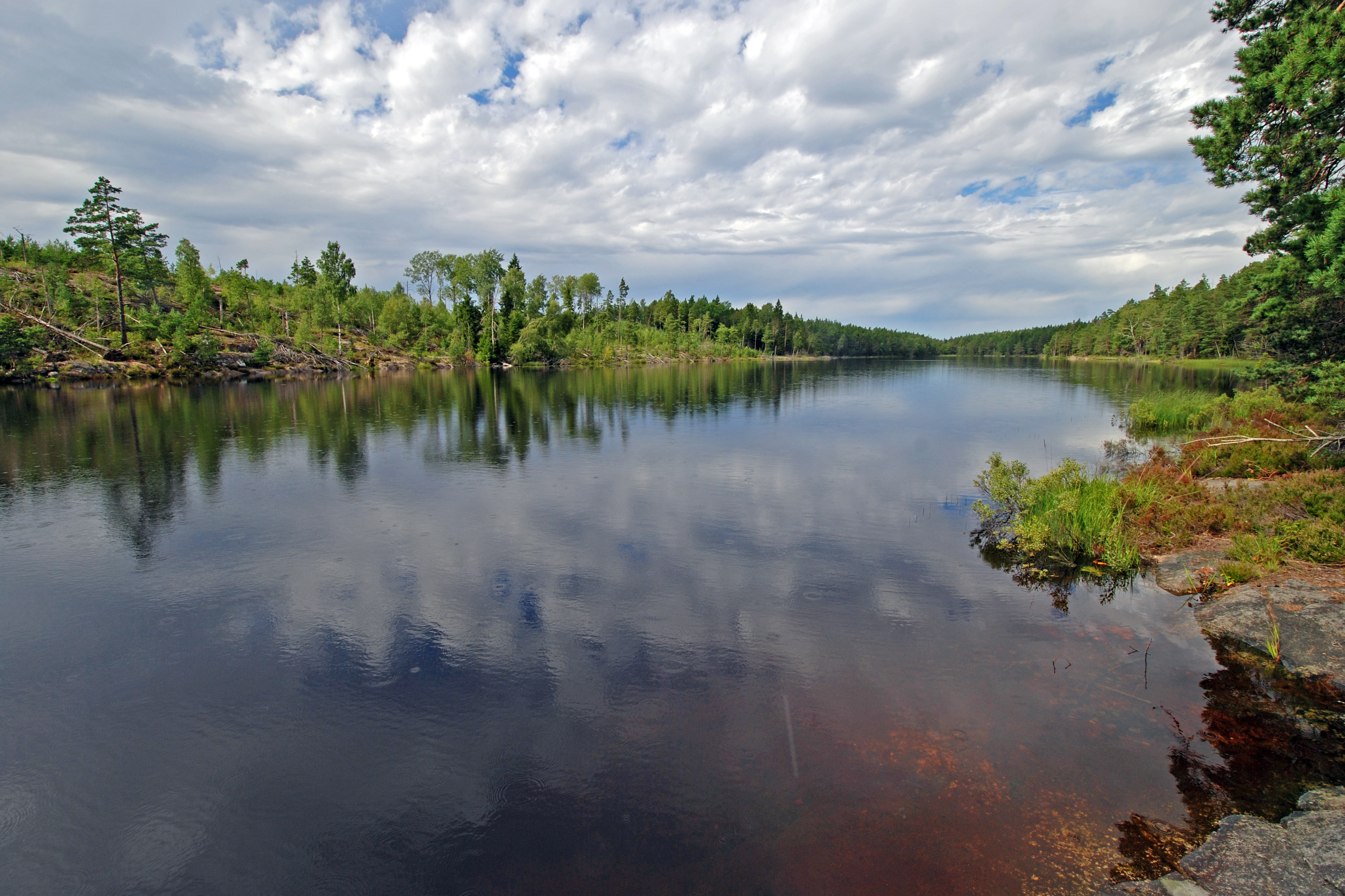 Långsjön, Tyresta